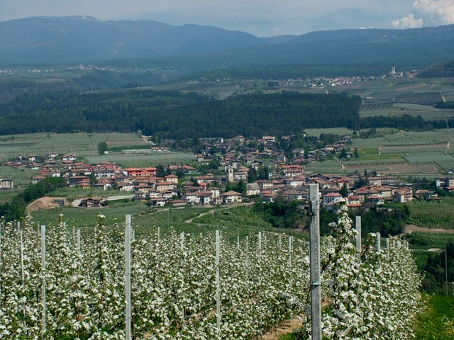 Panorama del paese di Taio, fotografato da ovest